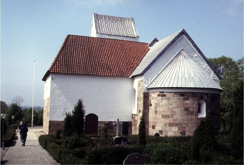 Højslev Kirke, set fra øst